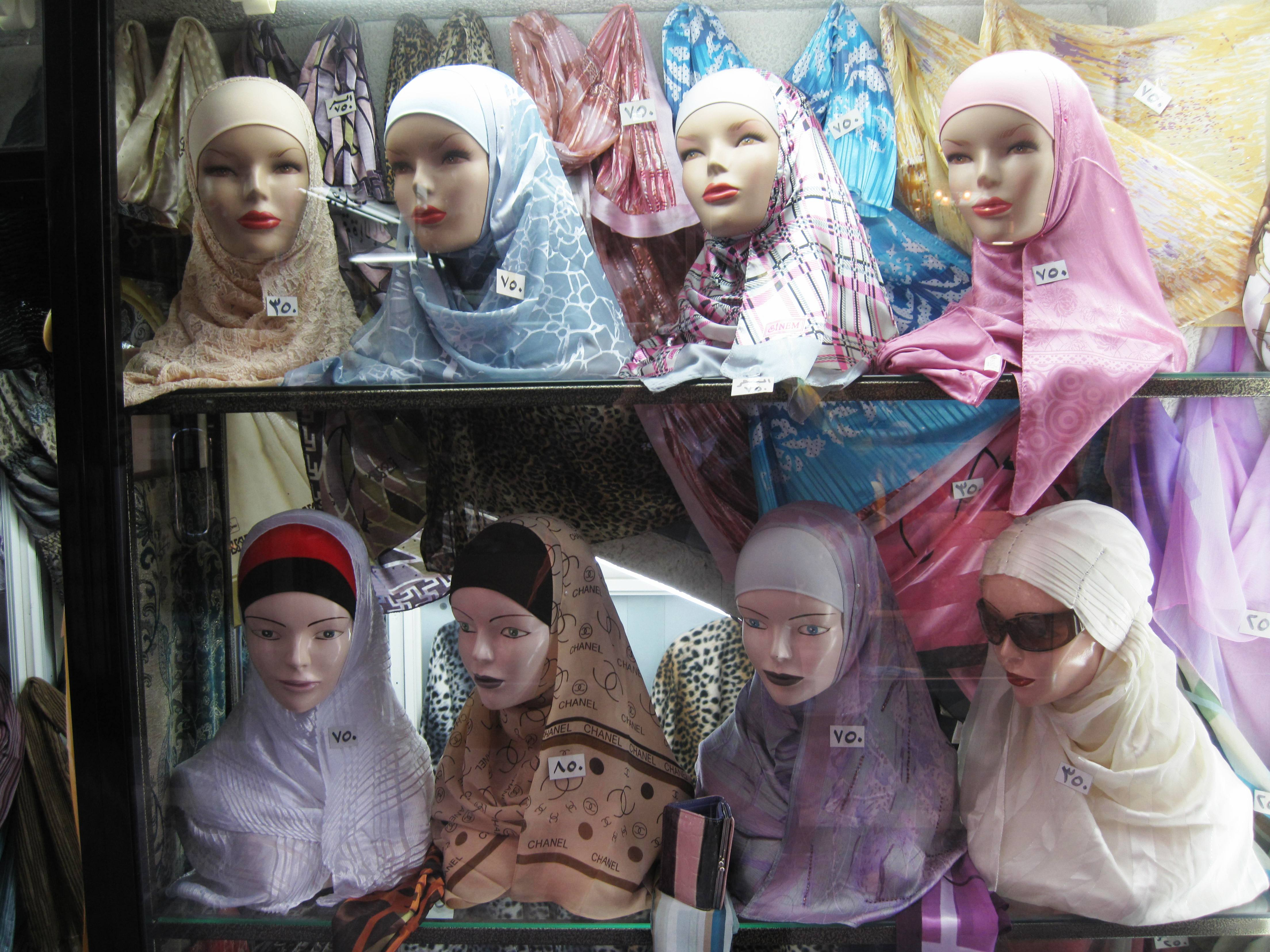 Damascus Souk El-Hamidiyeh 2